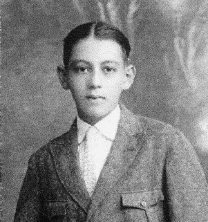 Raúl Aguilar Batres a los 15 años; retrato de estudio.